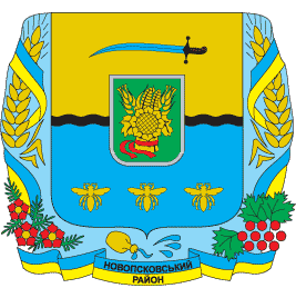 Герб Новопсковського району